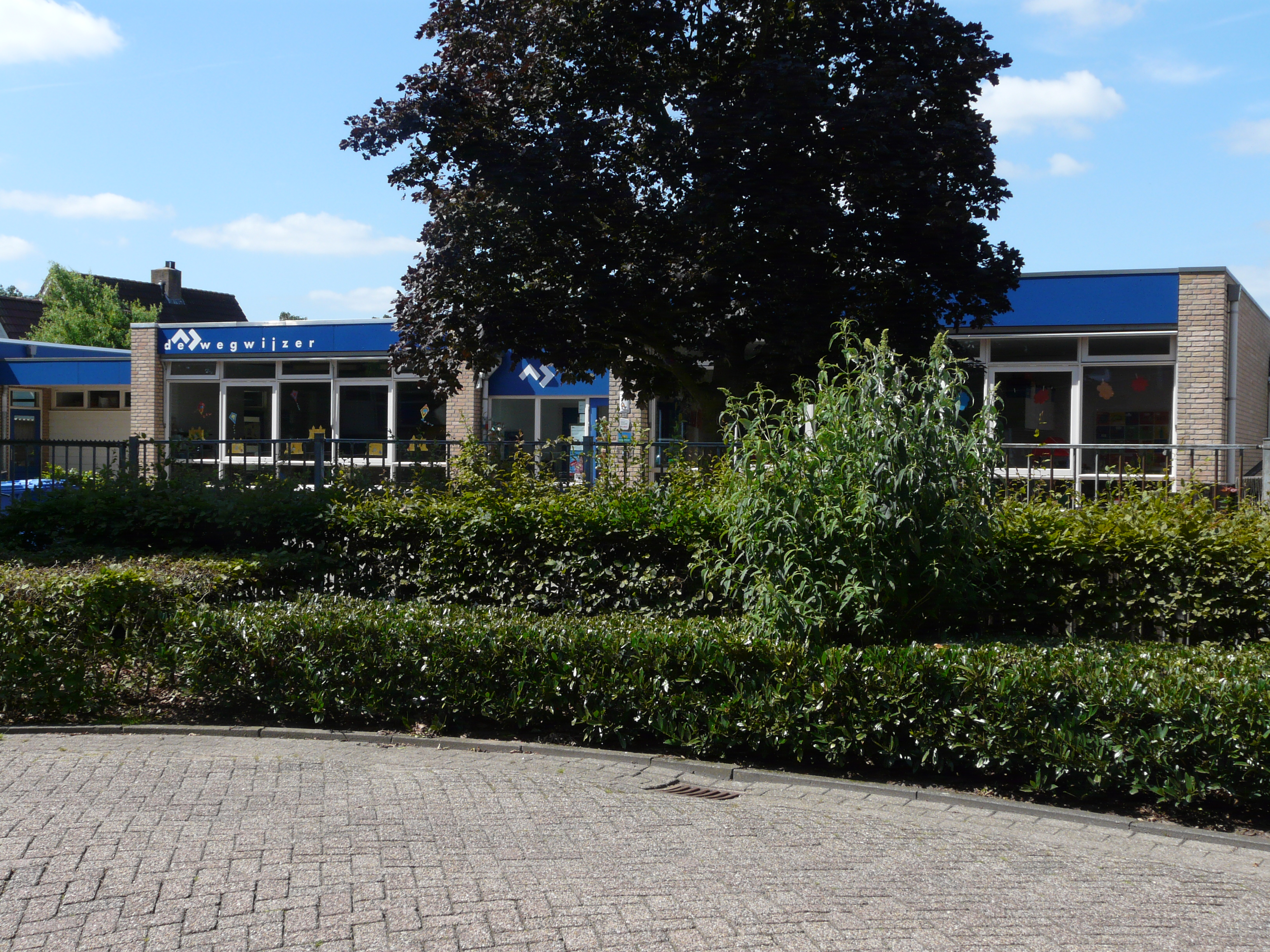 Basisschool de Wegwijzer in 's Gravenmoer